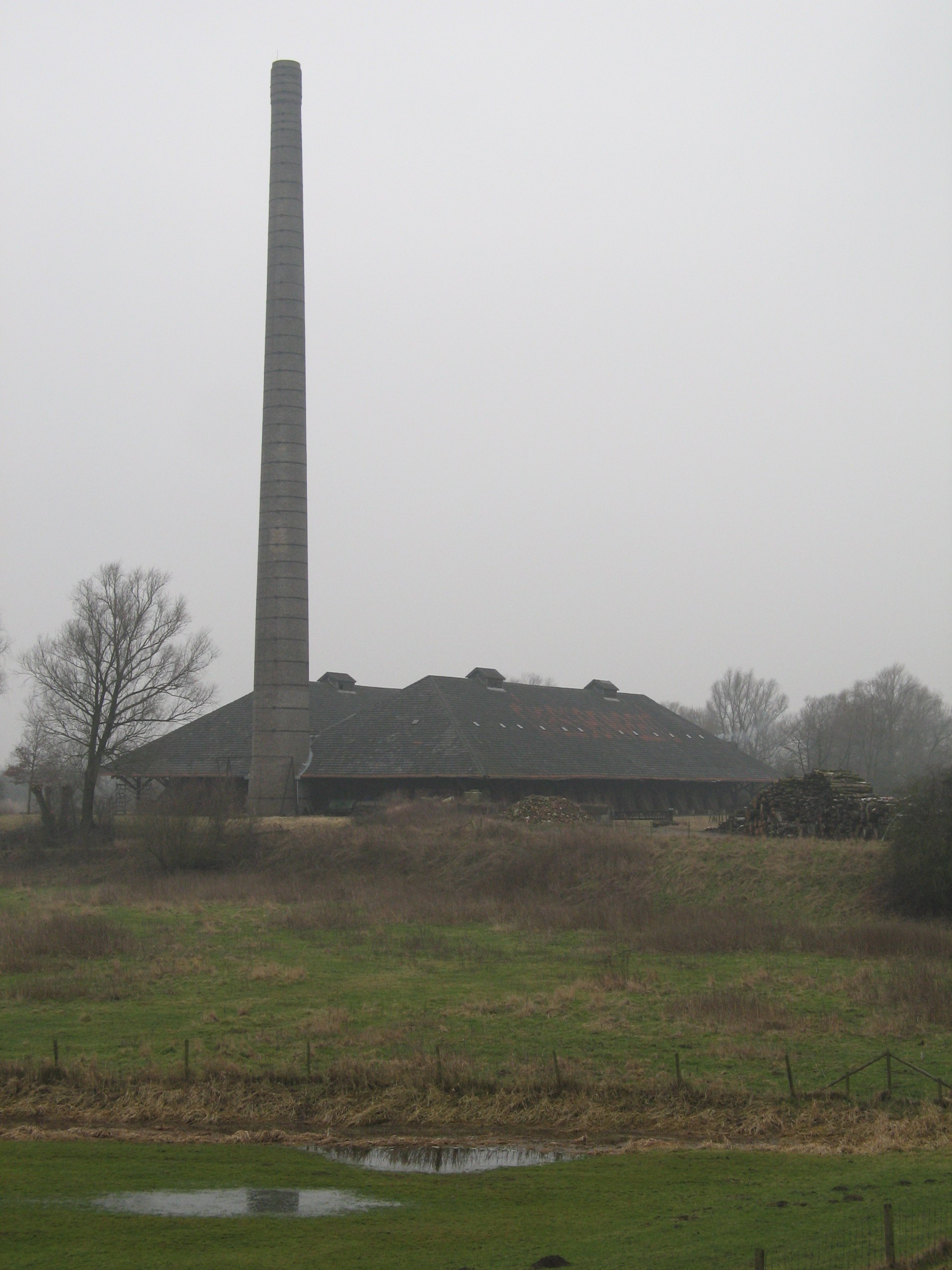 Steenoven de Plasserwaard 1930 A. van de Koppel Aan de Rijn 15 Rijksmonumentnummer 526109